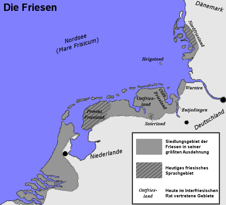 (Ehemaliges) Siedlungsgebiet der Friesen, heutiges friesisches Sprachgebiet, heute im Interfriesischen Rat vertretene friesische Landstriche.